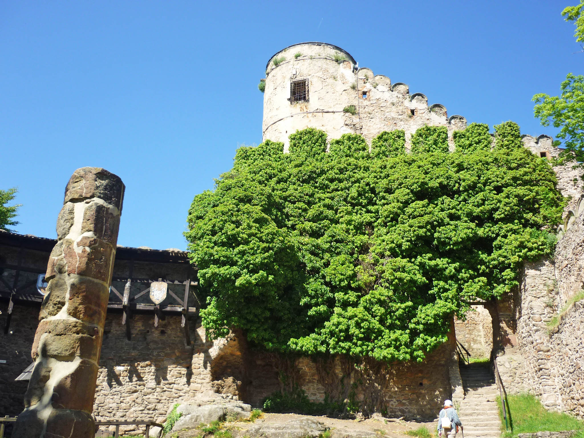 Zalesione wzgórze porośnięte bukami, sosnami i świerkami, położony w okolicach Jeleniej Góry-Sobieszowa). Góra Chojnik jest objęta rezerwatem przyrody i stanowi enklawę Karkonoskiego Parku Narodowego. Na szczycie góry znajdują się ruiny zamku Chojnik.